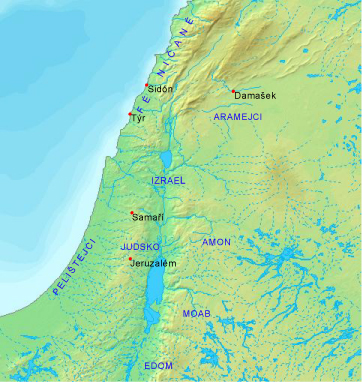 Orientační mapa Kenaánu s národy v době Izraelského a Judského království (1. pol. 1. tisíciletí př. Kr.) Disclaimer: With this statement DEMIS BV grants you permission to freely copy the PNG images returned by our server and use them for your own purposes, including web pages. We would appreciate a reference to our server but such a reference is not required, nor do we take responsibility for the accuracy or quality of the maps.